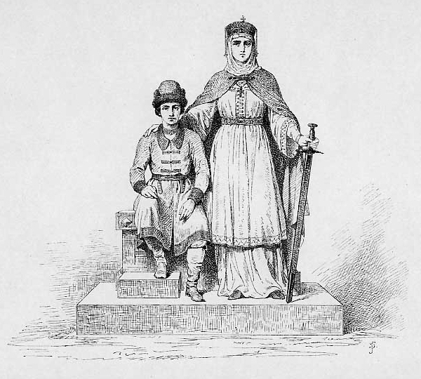 Правительница Княгиня Ольга. 945-964 г.Жена Игоря, Ольга, жестоко отомстила Древлянам за убиение мужа, во время малолетства сына мудро правила страною. Приняла христианство и Церковь нарекла её "Равноапостольною".